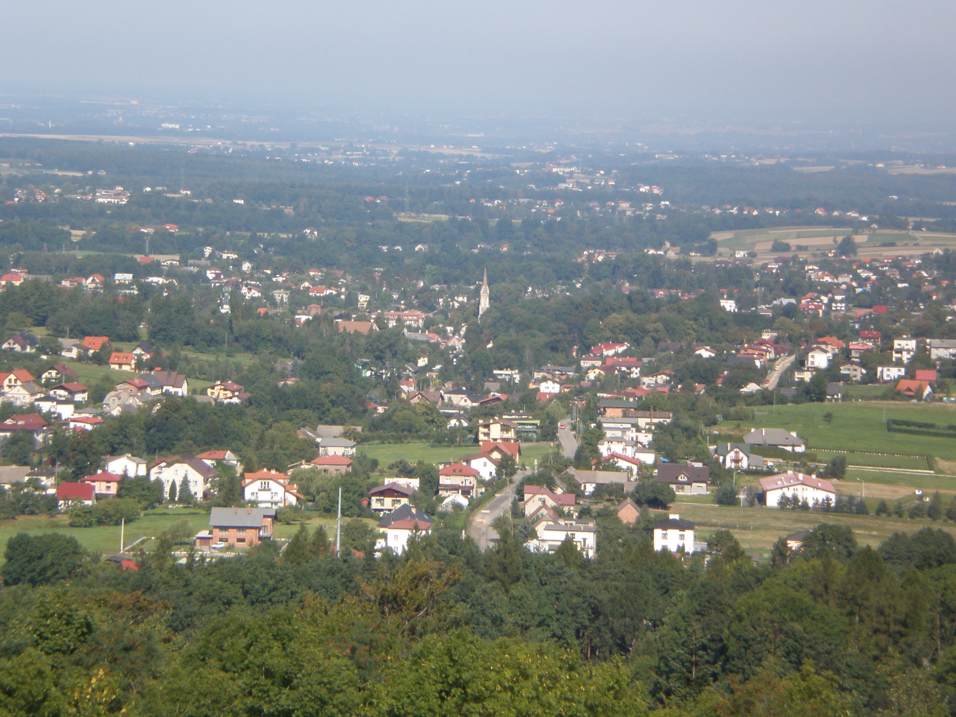 Kozy